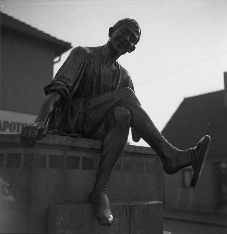 Braunschweig Stadtaufnahmen Eulenspiegelbrunnen